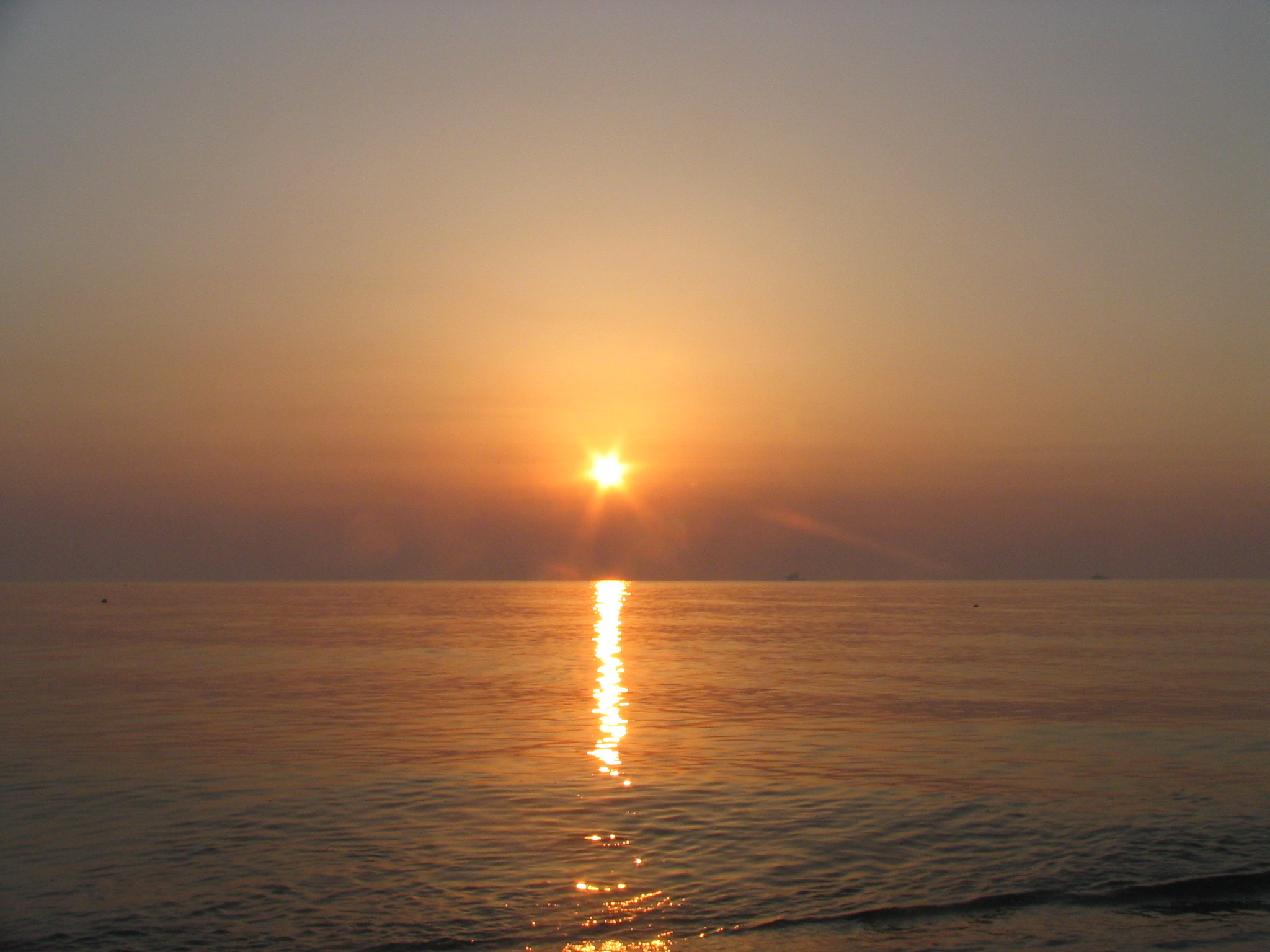 Amanecer en el mar negro